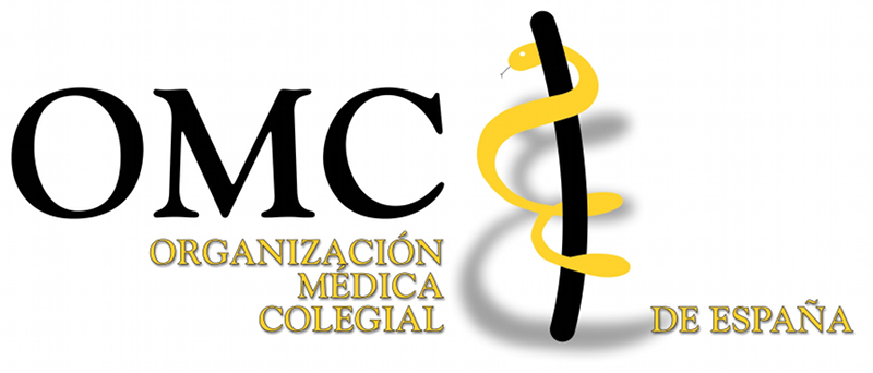 Logo de la Organización Médica Colegial